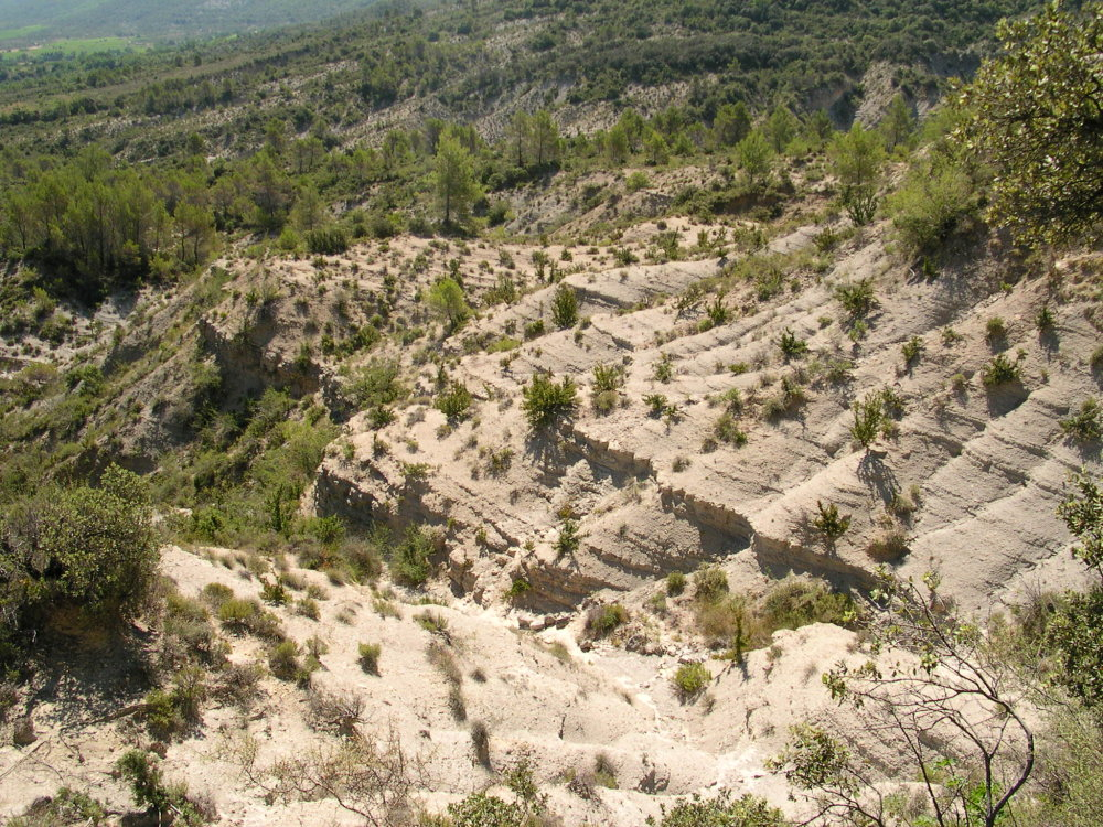 POMPIGNAN (France, Gard), Montredon Talweg marneux sur les contreforts du Montredon.